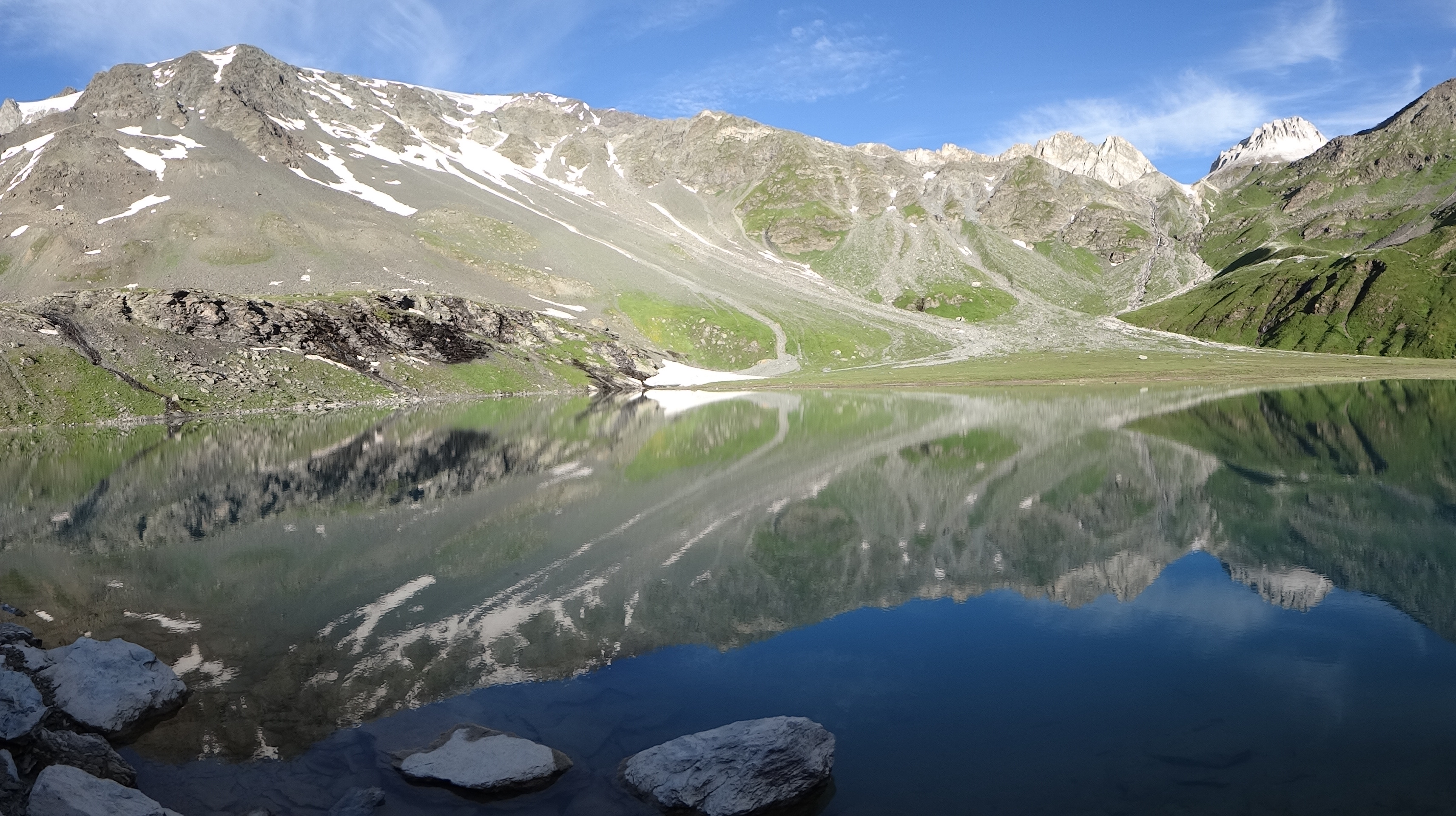 Col du Soufre(2819m) et lac Blanc(2429m)